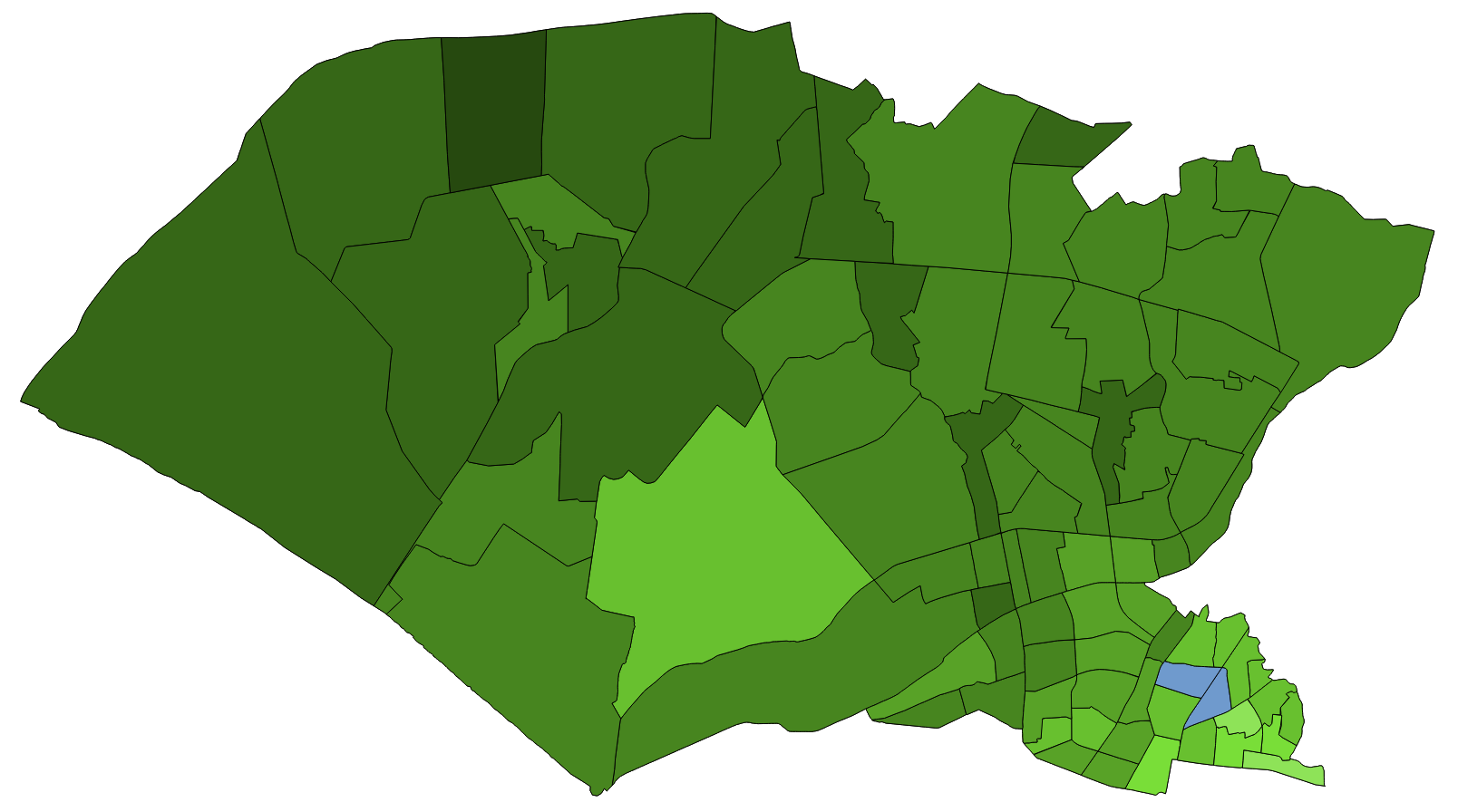 顏色對照表